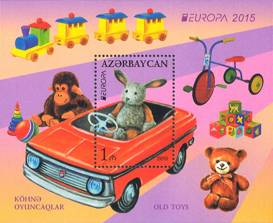 Köhnə oyuncaqlar